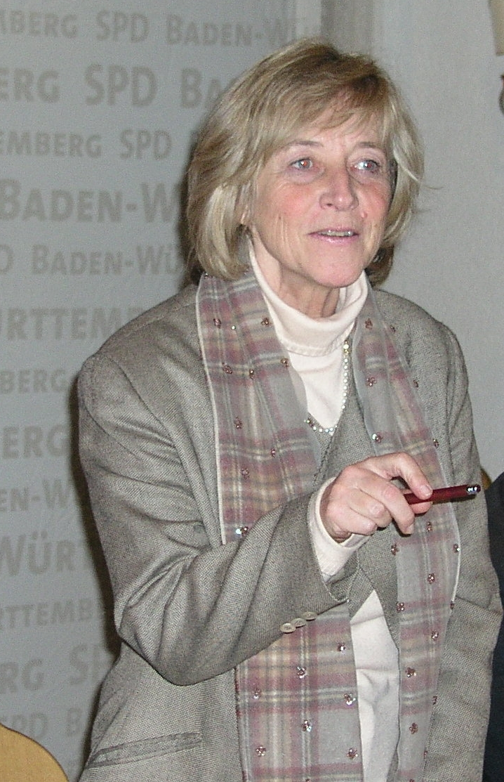 Beate Weber, 25.01.2006, Neckarsulm (Germany), Wahlkampfveranstaltung zum "Politischen Aschermittwoch"